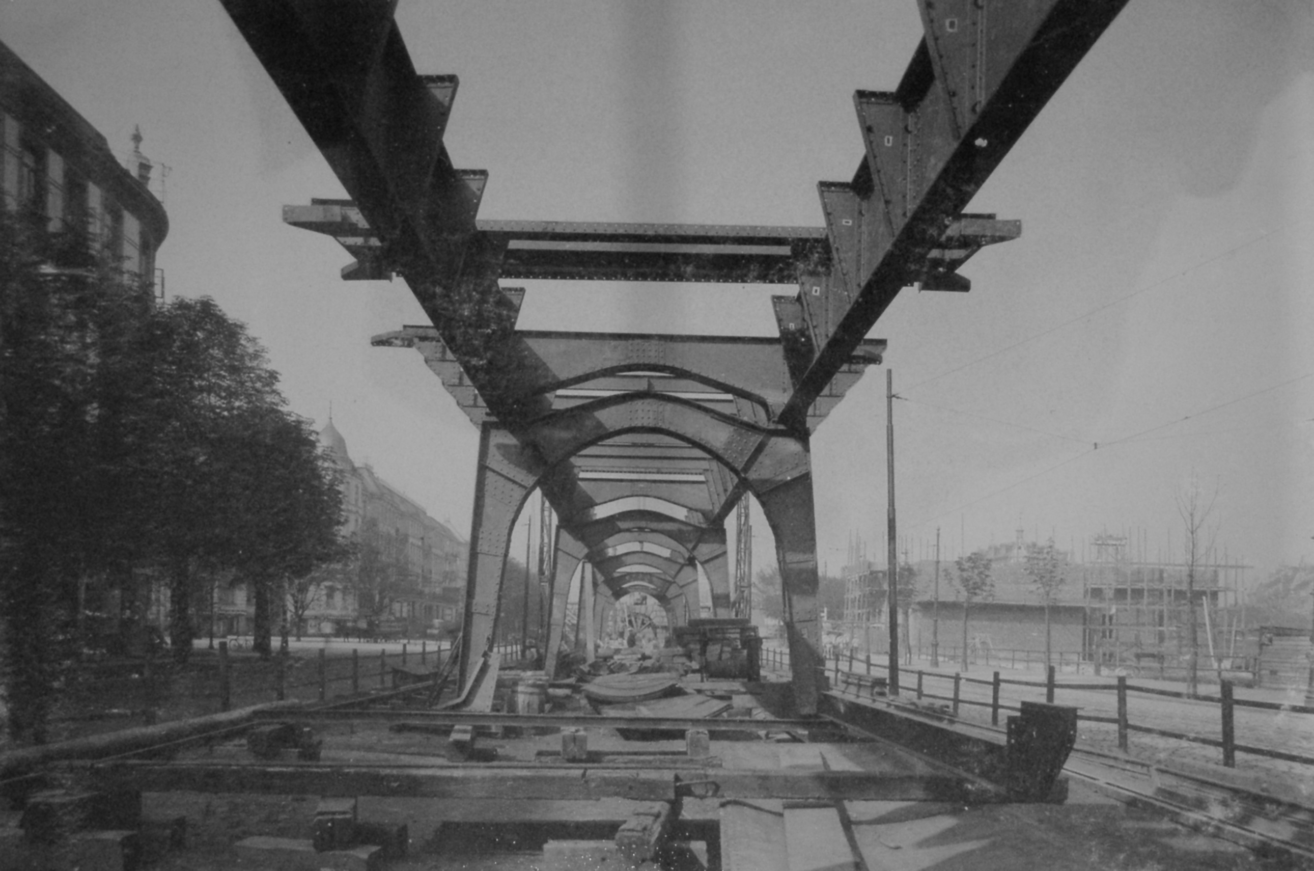 Bau des Hochbahnviadukt zwischen Innoncentiastraße und Klosterallee 1909